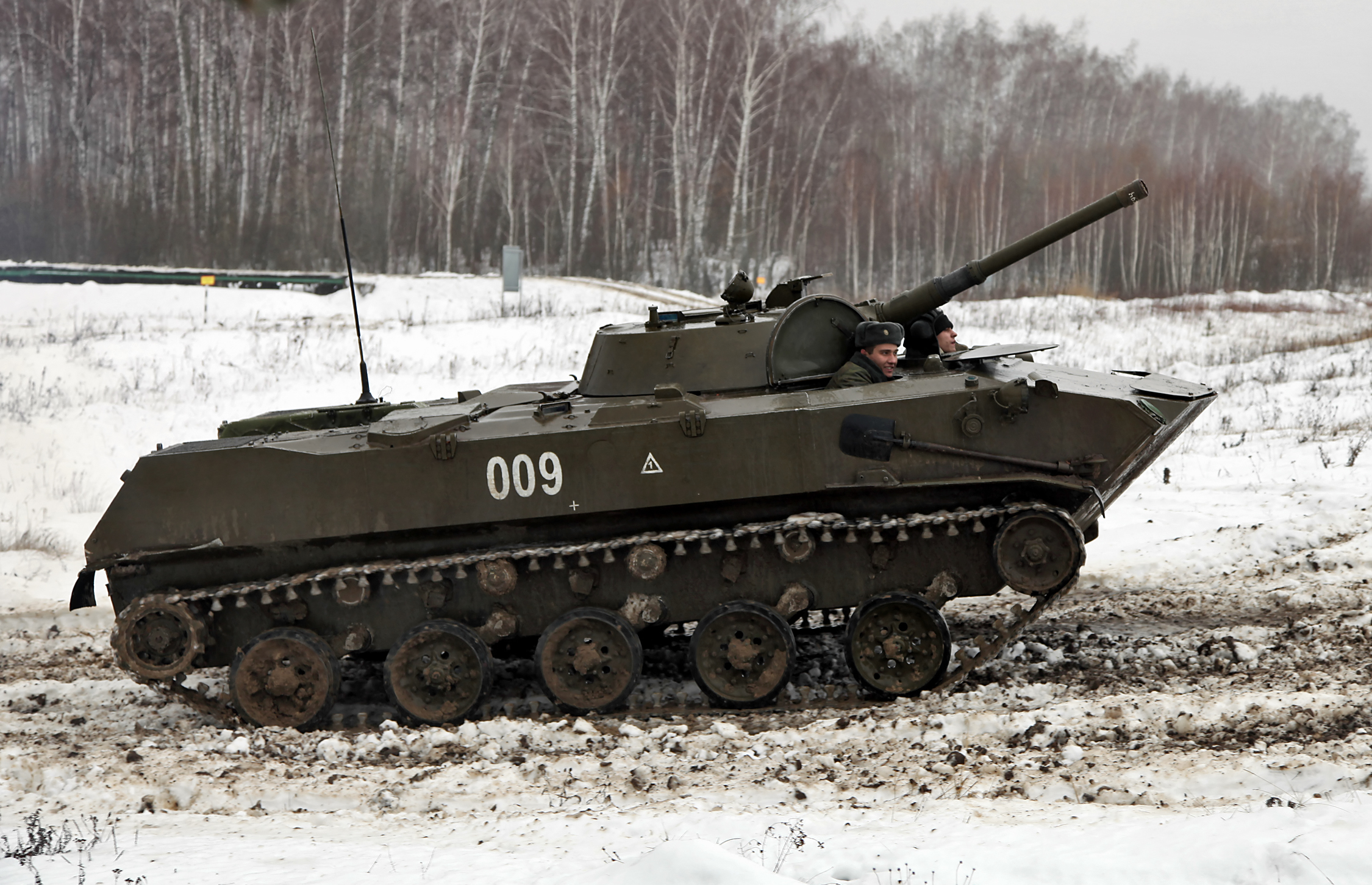 БМД-1 (BMD-1 IFV)